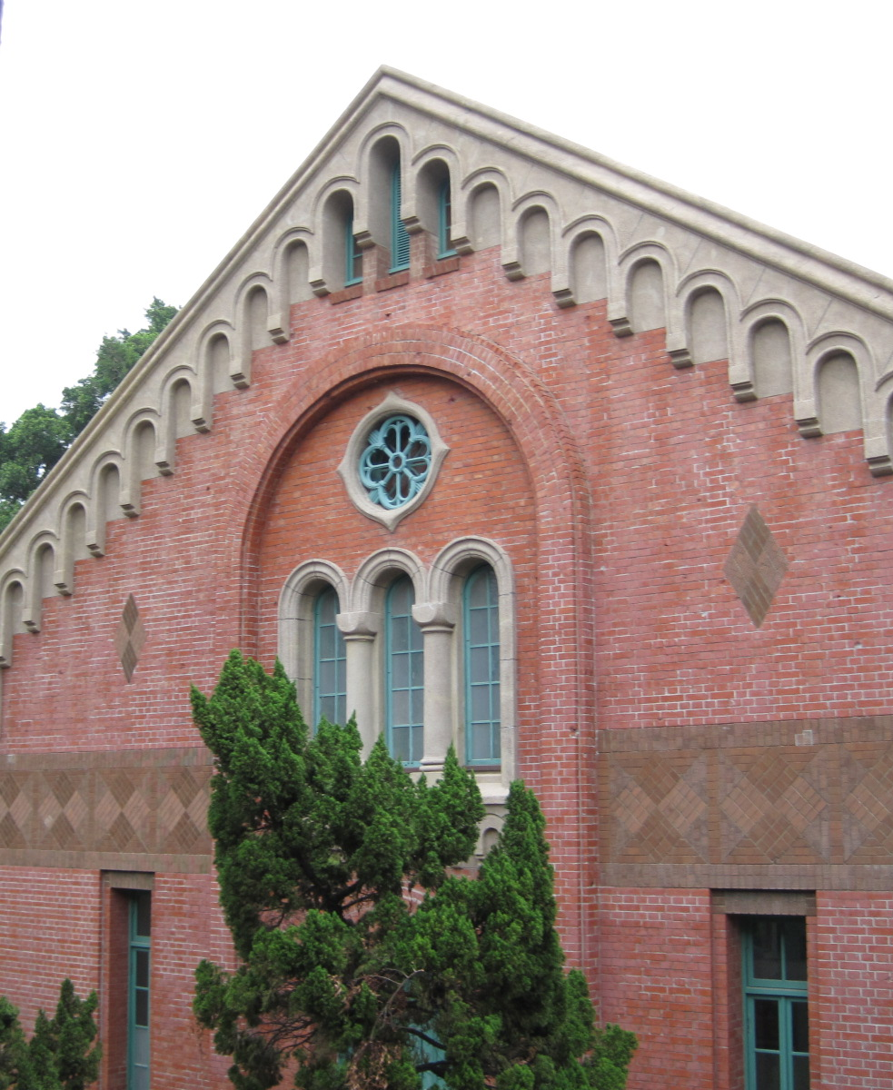 臺南一中小禮堂西面